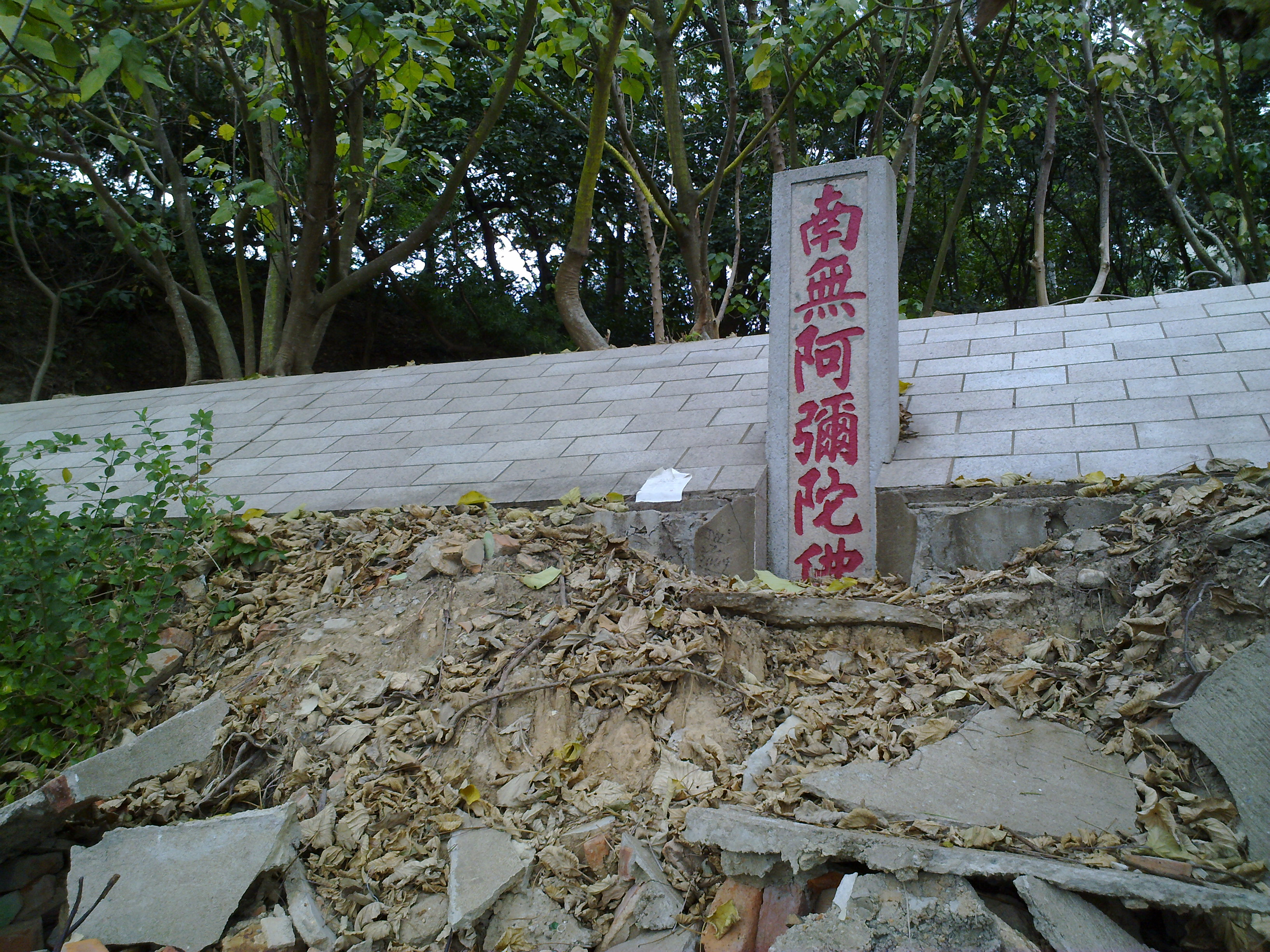 中文（香港）: 鎮流碑_馬角咀